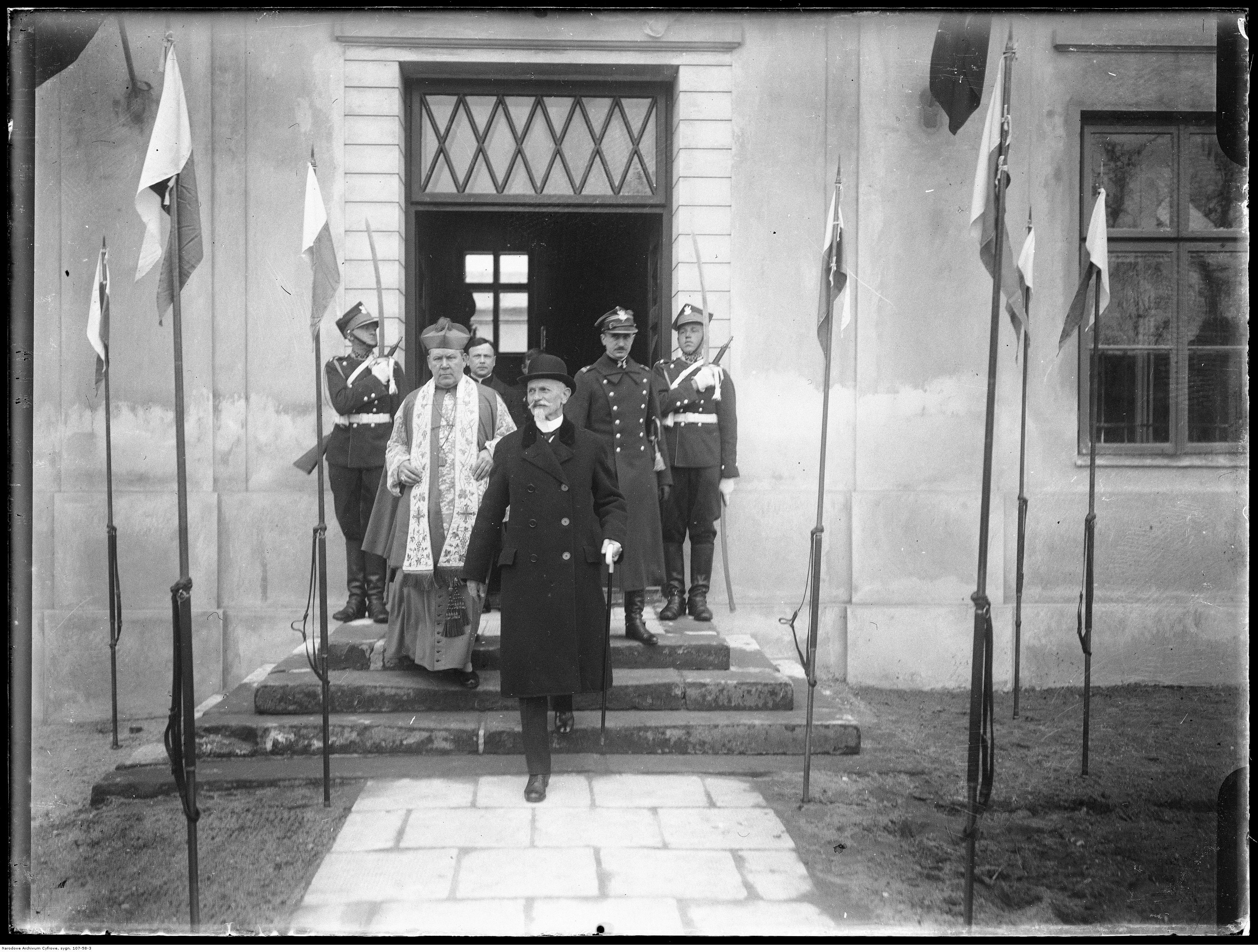 Prezydent RP Stanisław Wojciechowski (na 1. planie) i biskup polowy WP Stanisław Gall (2. z lewej) wychodzą z budynku koszar.